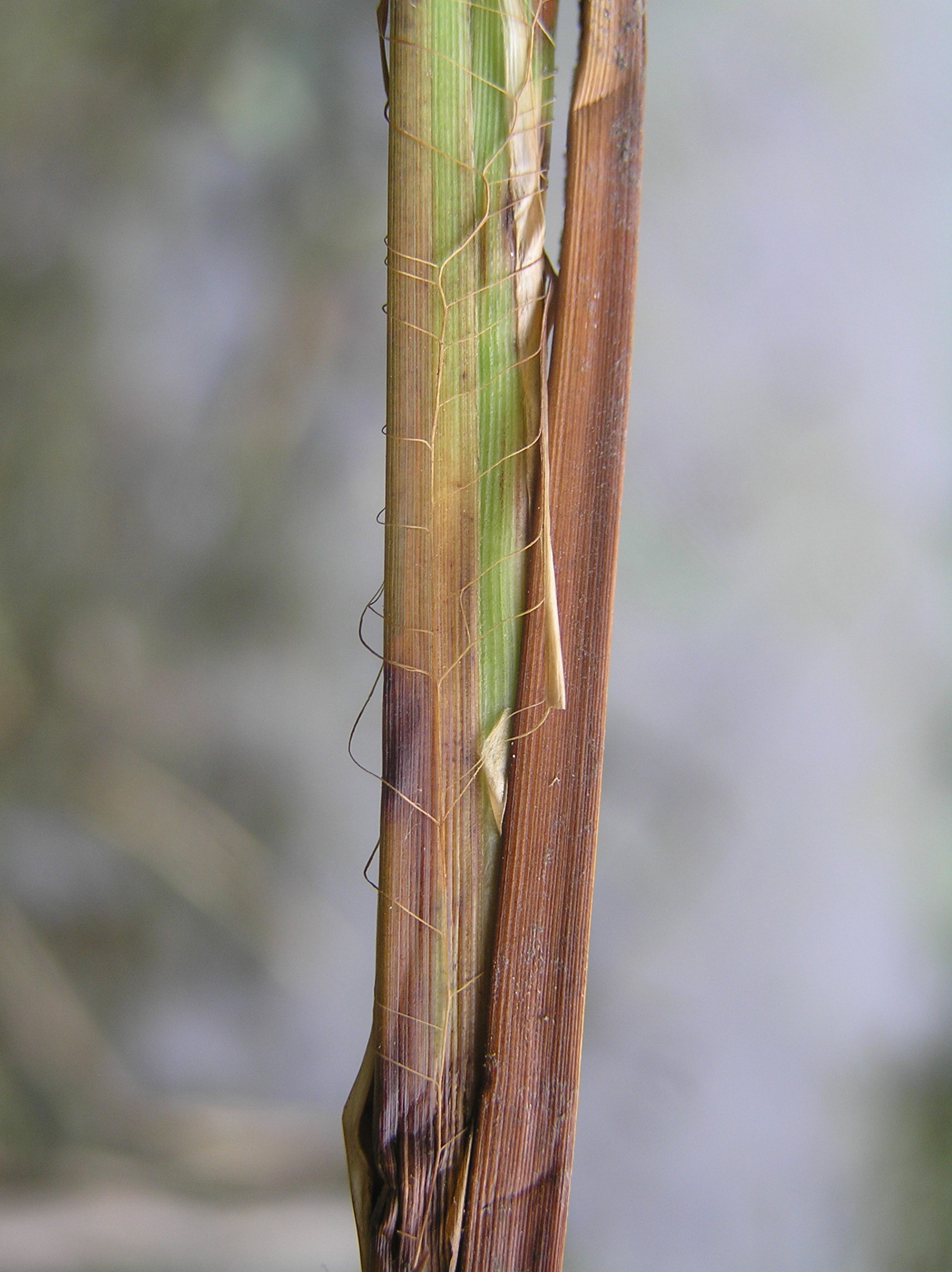 Carex buekii, Břeclav, Czech Republic